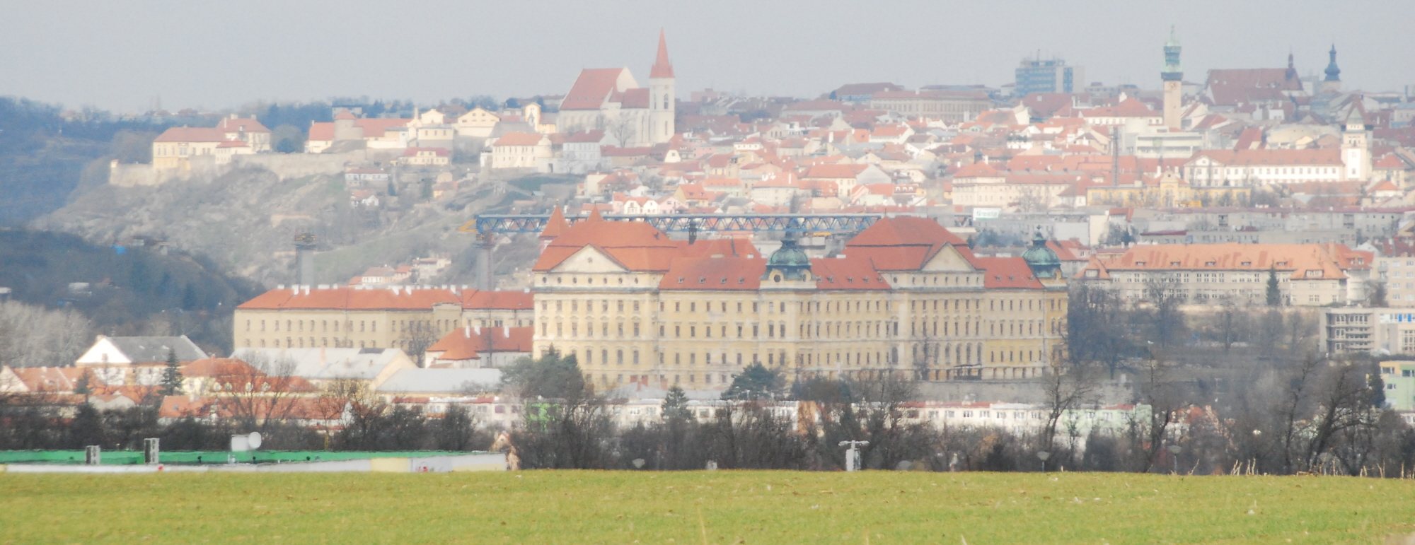 Znaim an der Thaya mit dem Stift Klosterbruck